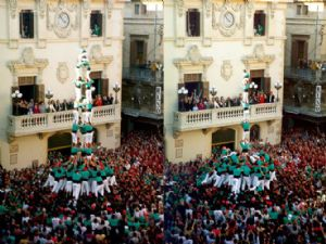 Primer 4 de 9 amb folre i l'agulla dels Castellers de Vilafranca